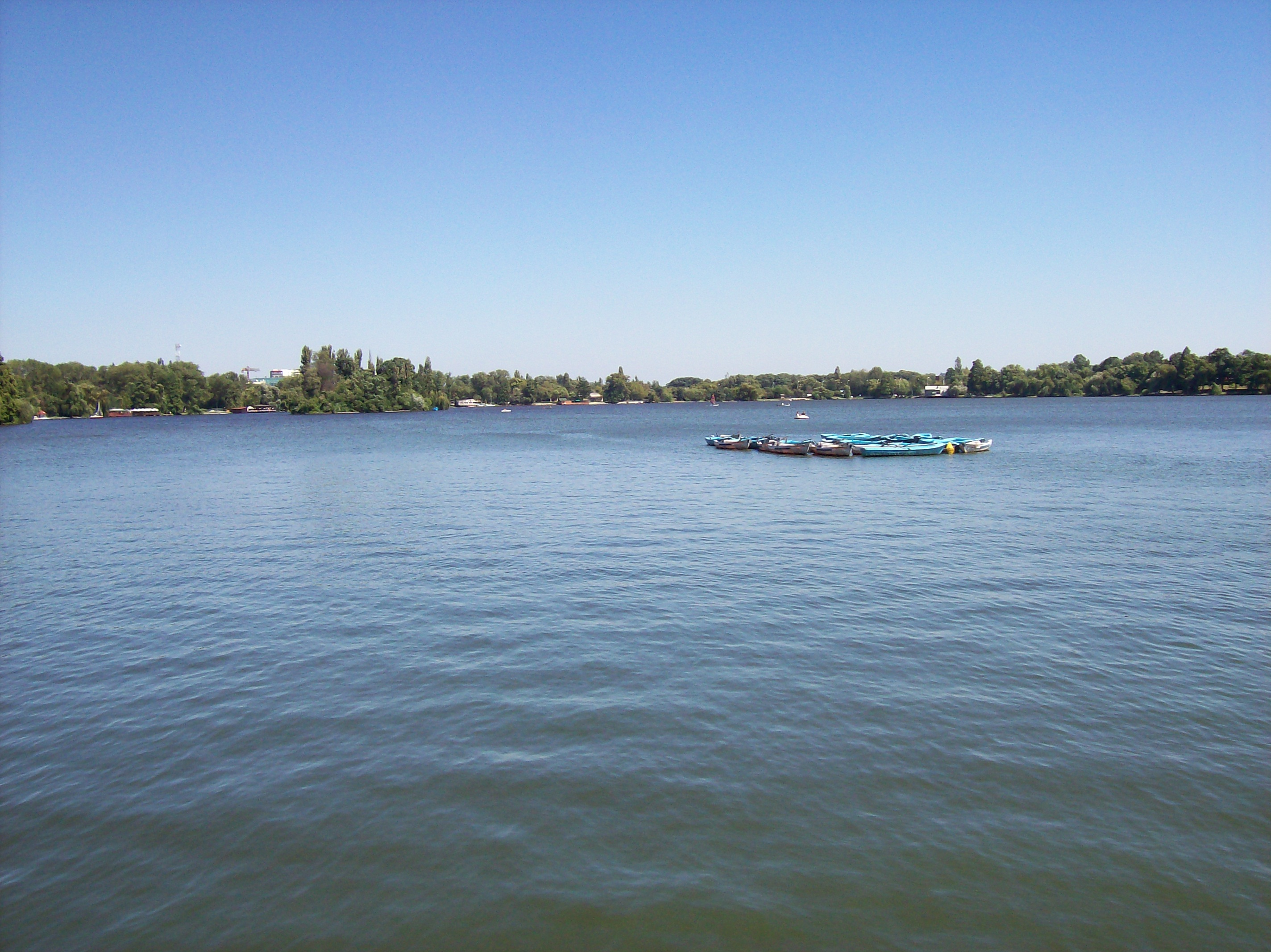 zomer 2006. zelfgemaakt. Herastraumeer boekarest.